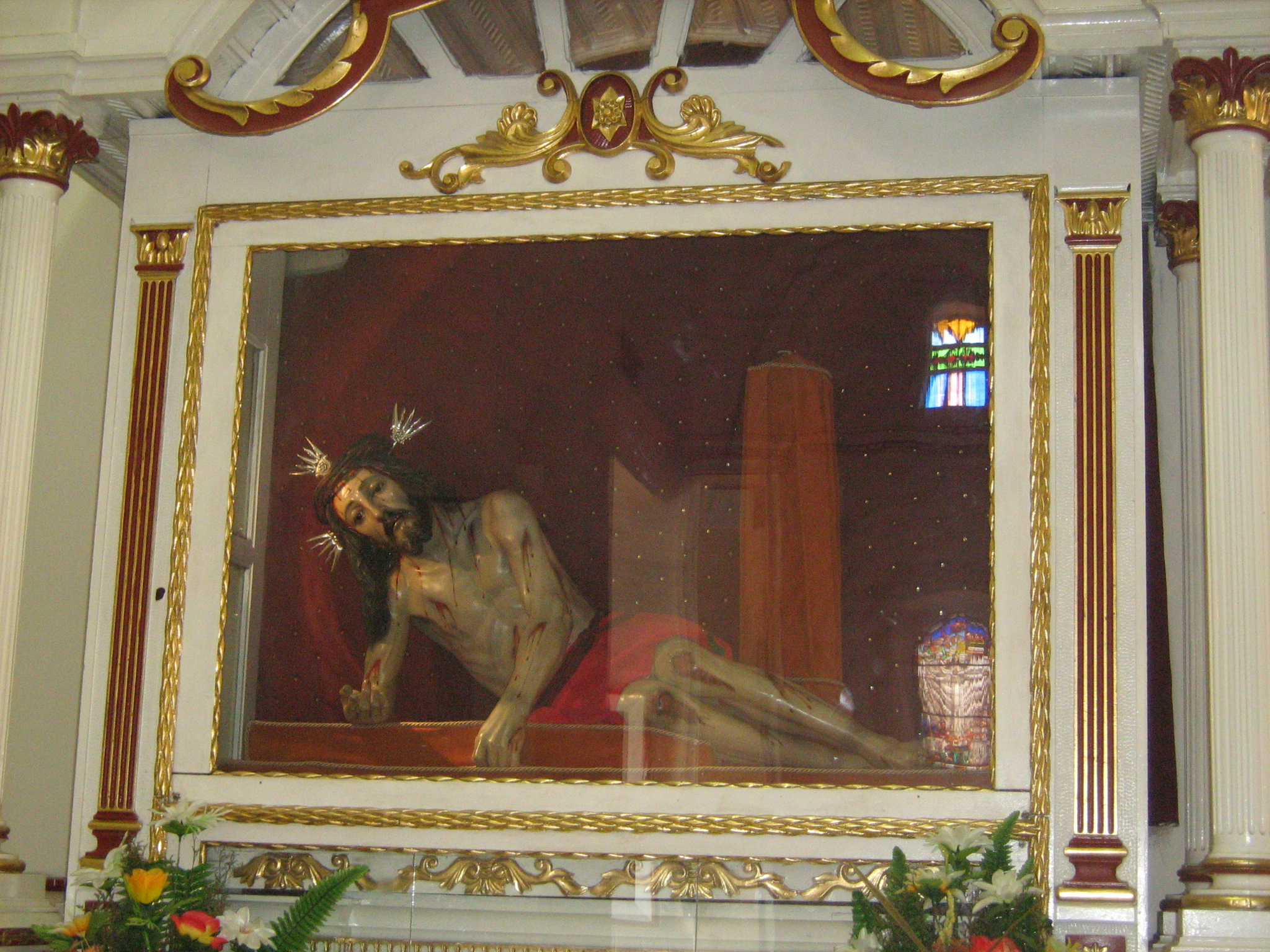 Imagen del Señor Caído de la Basílica de Yarumal, Antioquia, Colombia.